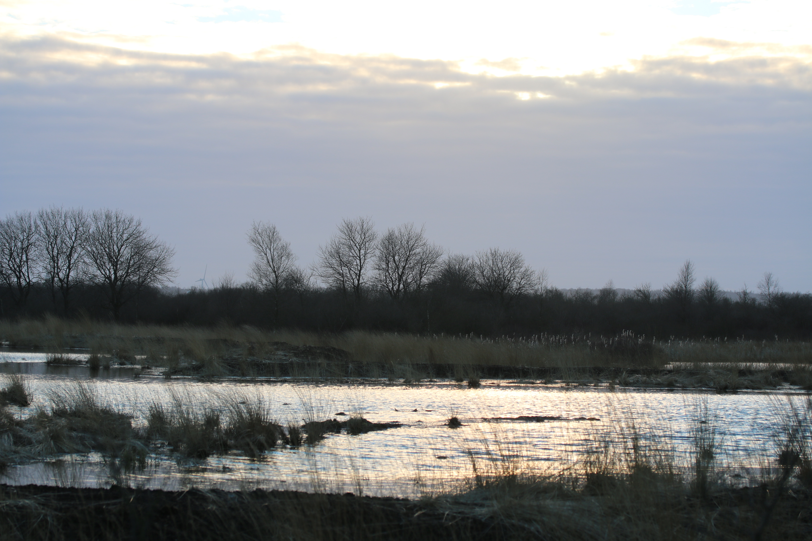 Das - noch - offene Wasser im Abendlicht, Naturschutzgebiet „Ahrenviölfelder Westermoor“ (NSG 64), gelegen zwischen Schleswig und Husum